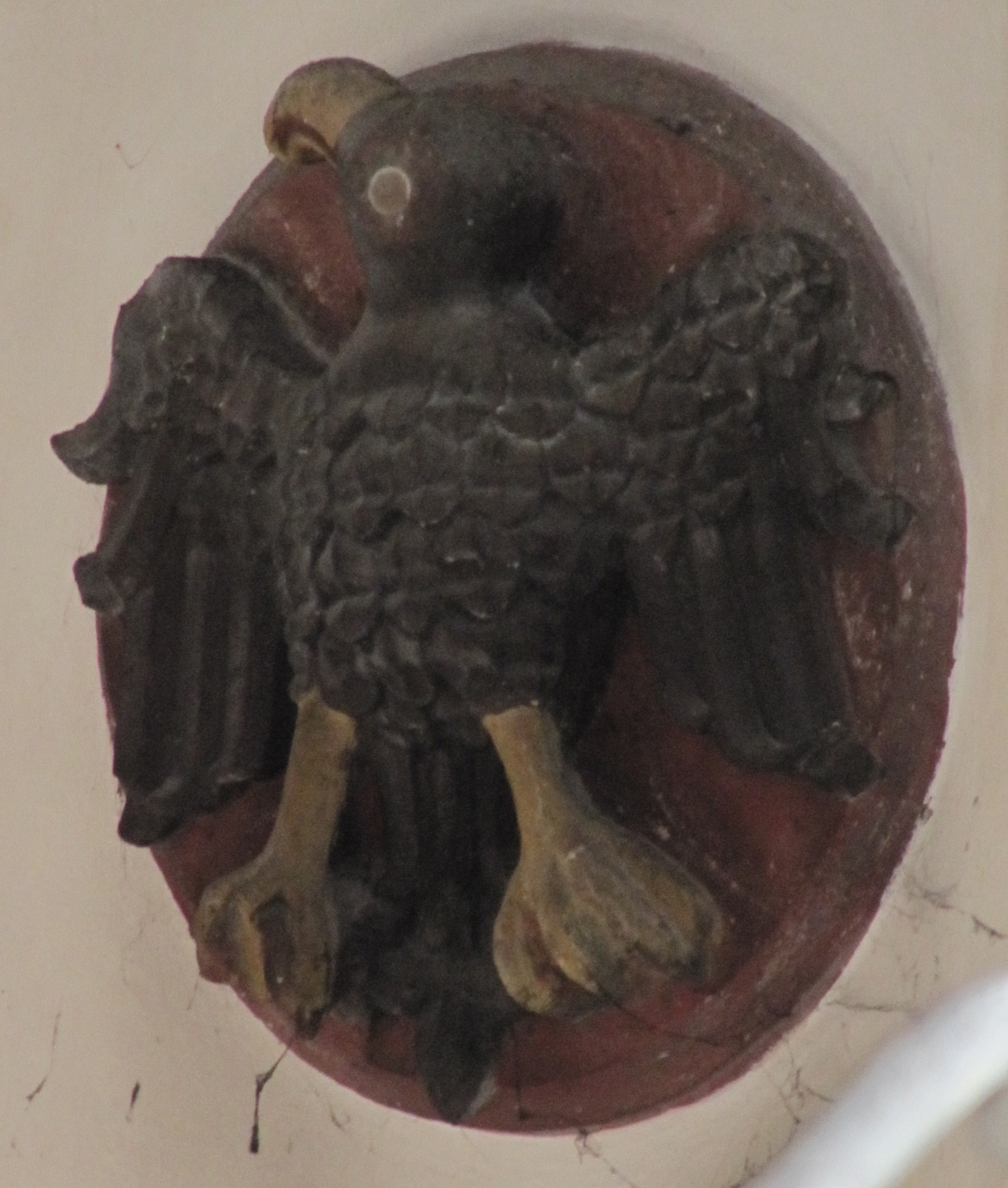 Adlersymbol des Evangelisten Johannes